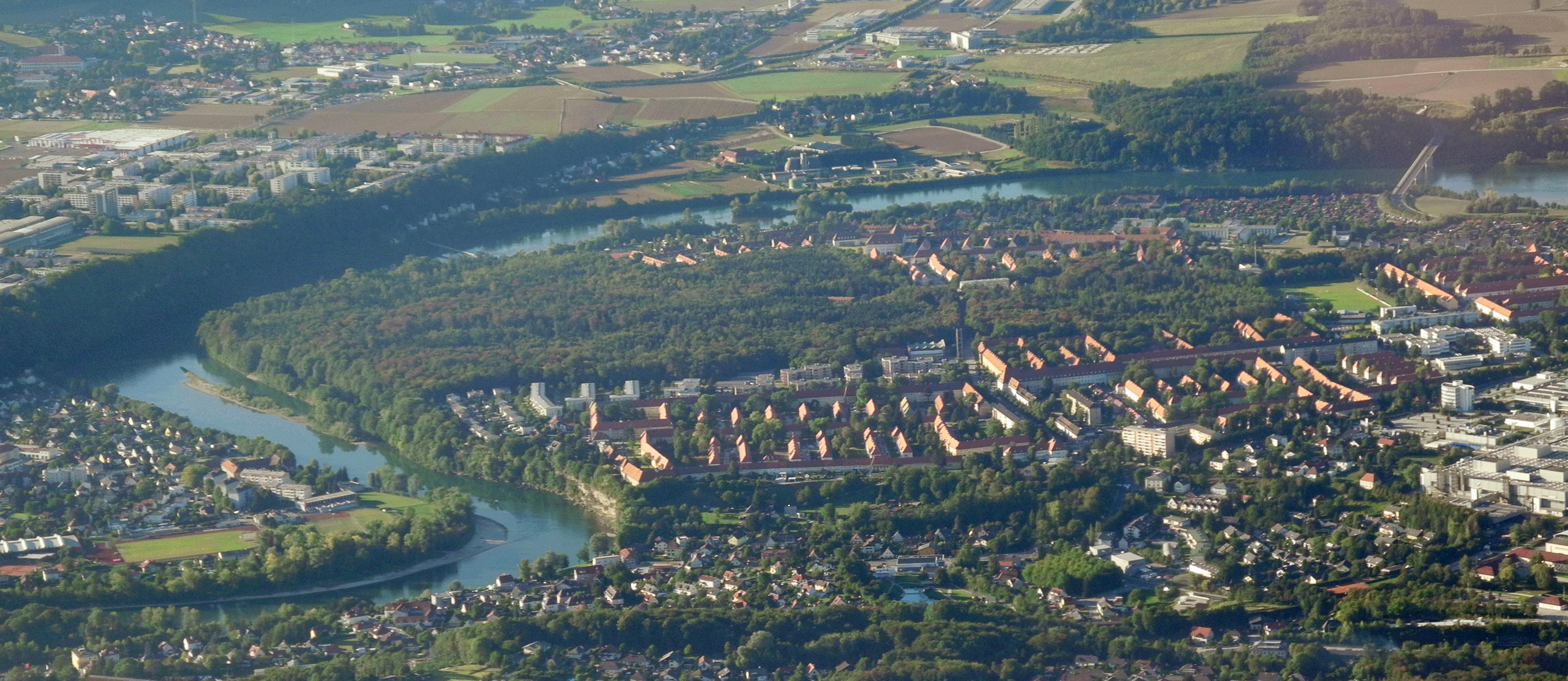 Luftbild des Steyrer Stadtteils Münichholz und des Münichholzer Waldes